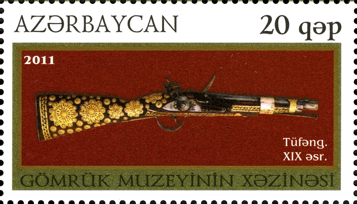 Gömrük Muzeyinin xəzinəsi